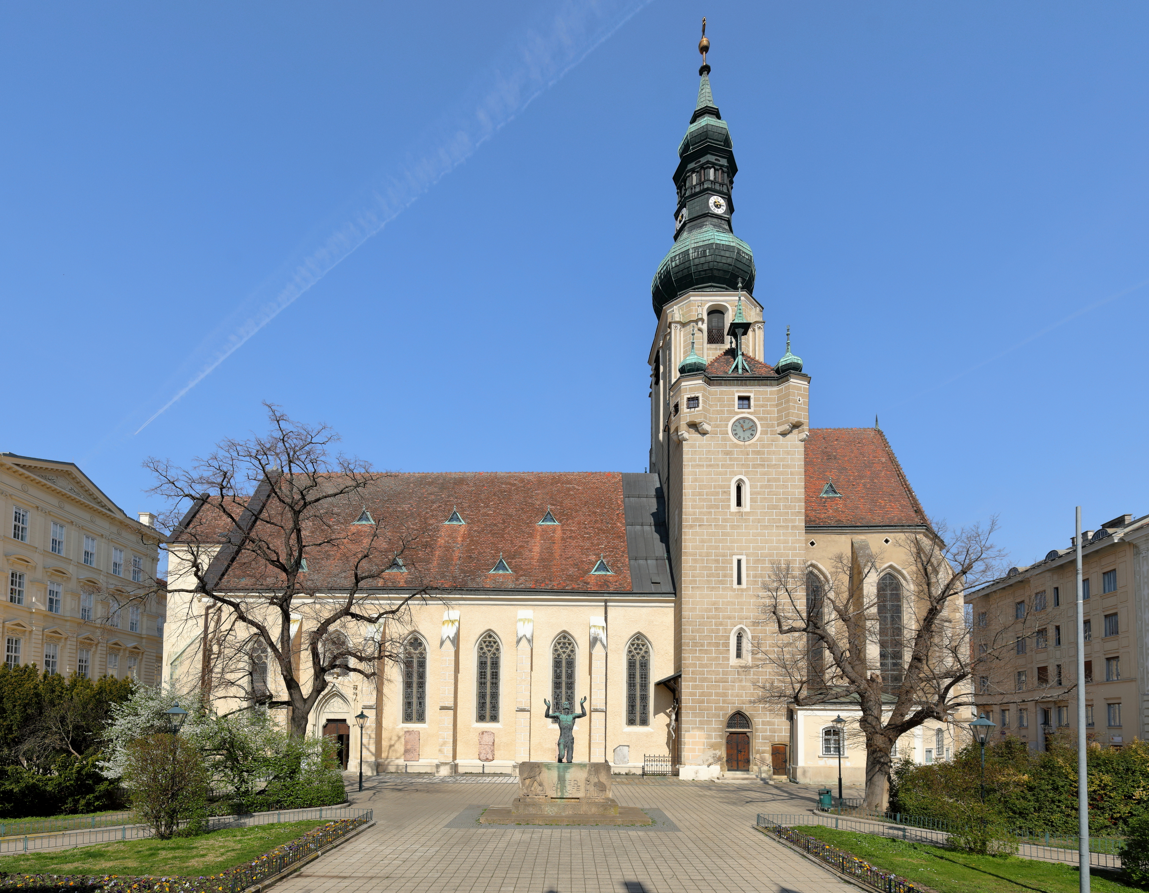 Südansicht der röm.-kath. Stadtpfarrkirche St. Stephan in der niederösterreichischen Stadt Baden und davor der Pfarrplatz mit dem 1954 errichteten Kriegerdenkmal.Die Kirche wurde in mehreren Bauphasen im 14. und 15. Jahrhundert anstelle einer romanischen Vorgängerkirche errichtet. Zerstört wurde sie um 1480 von Mathias Corvinus, bei der 1. Türkenbelagerung 1529 und bei der zweiten 1683. Nach dieser wurde der Westturm großteils abgetragen und der Hauptturm im Osten barockisiert, sowie der Zwiebelhelm mit Laterne aufgesetzt.